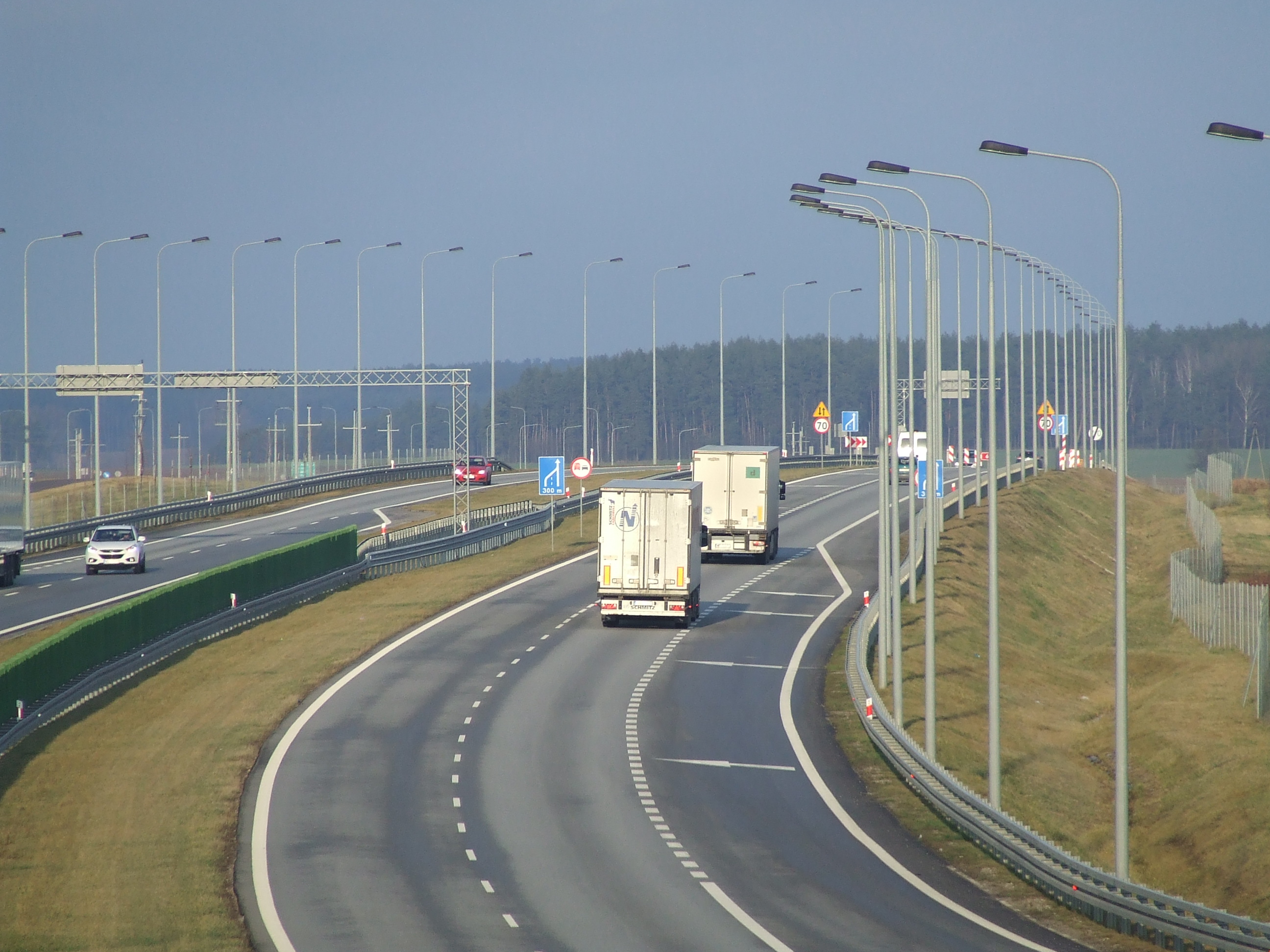 Obwodnica Stawisk (powiat kolneński)